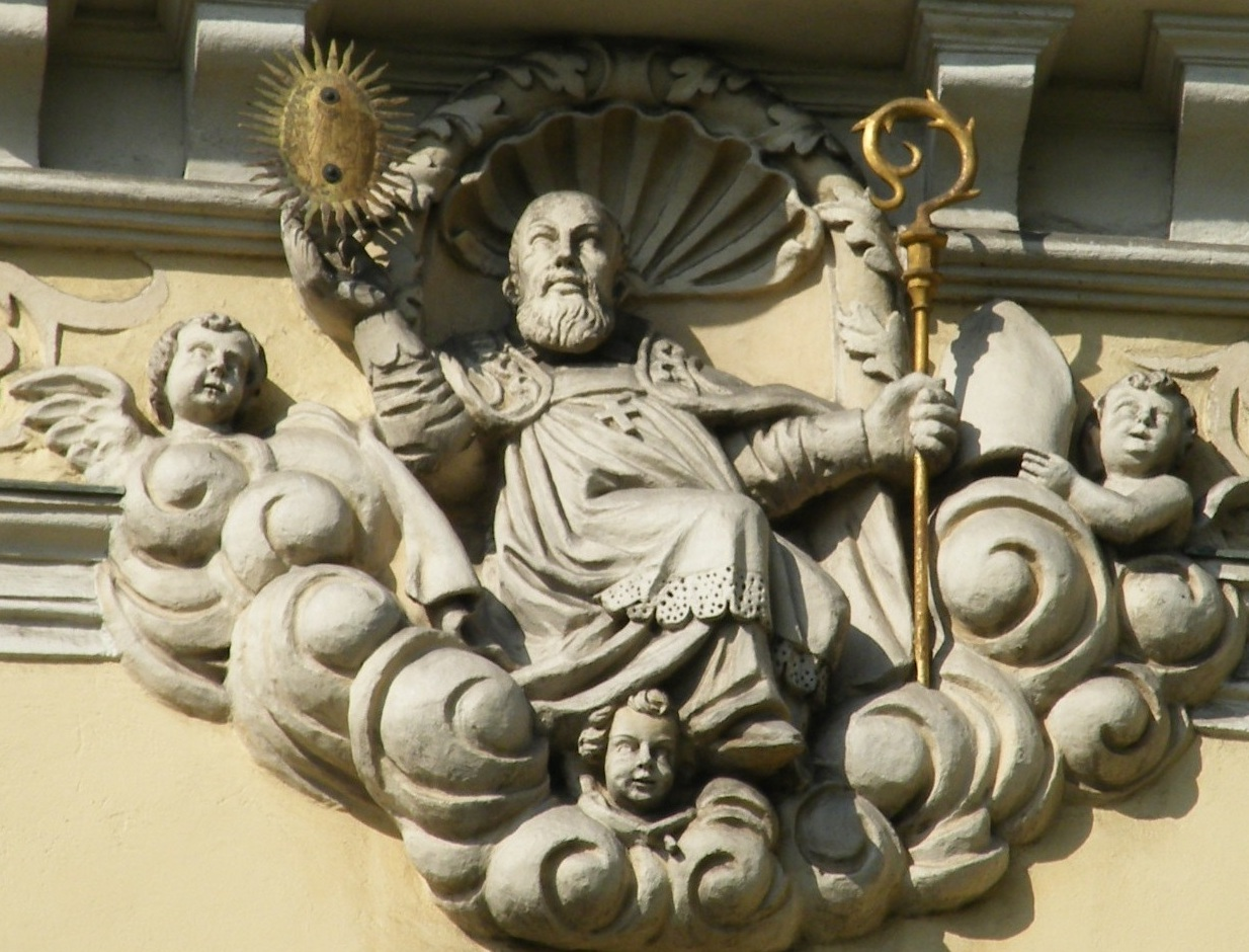 Kraków, ul. Krowoderska 16 - Kościół św. Franciszka Salezego, detal fasady: Franciszek Salezy (zabytek nr A-88 oraz A-217/M)